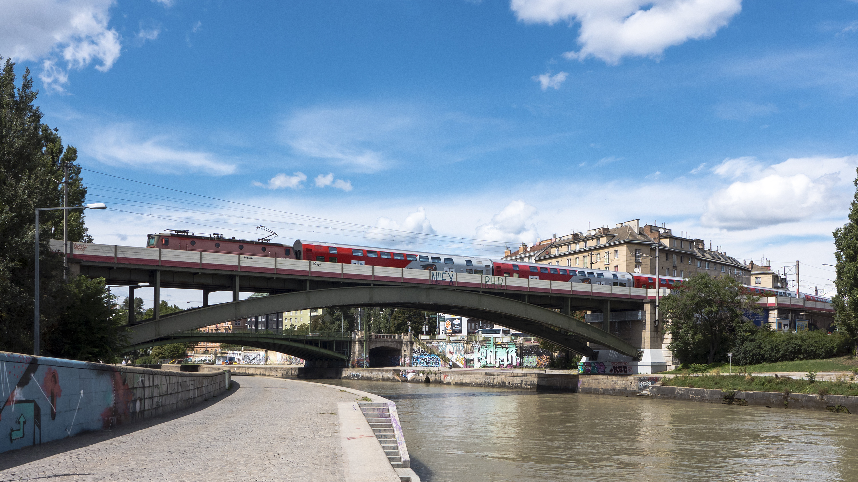 Verbindungsbahnbrücke in Wien 3 Richtung Nordwesten